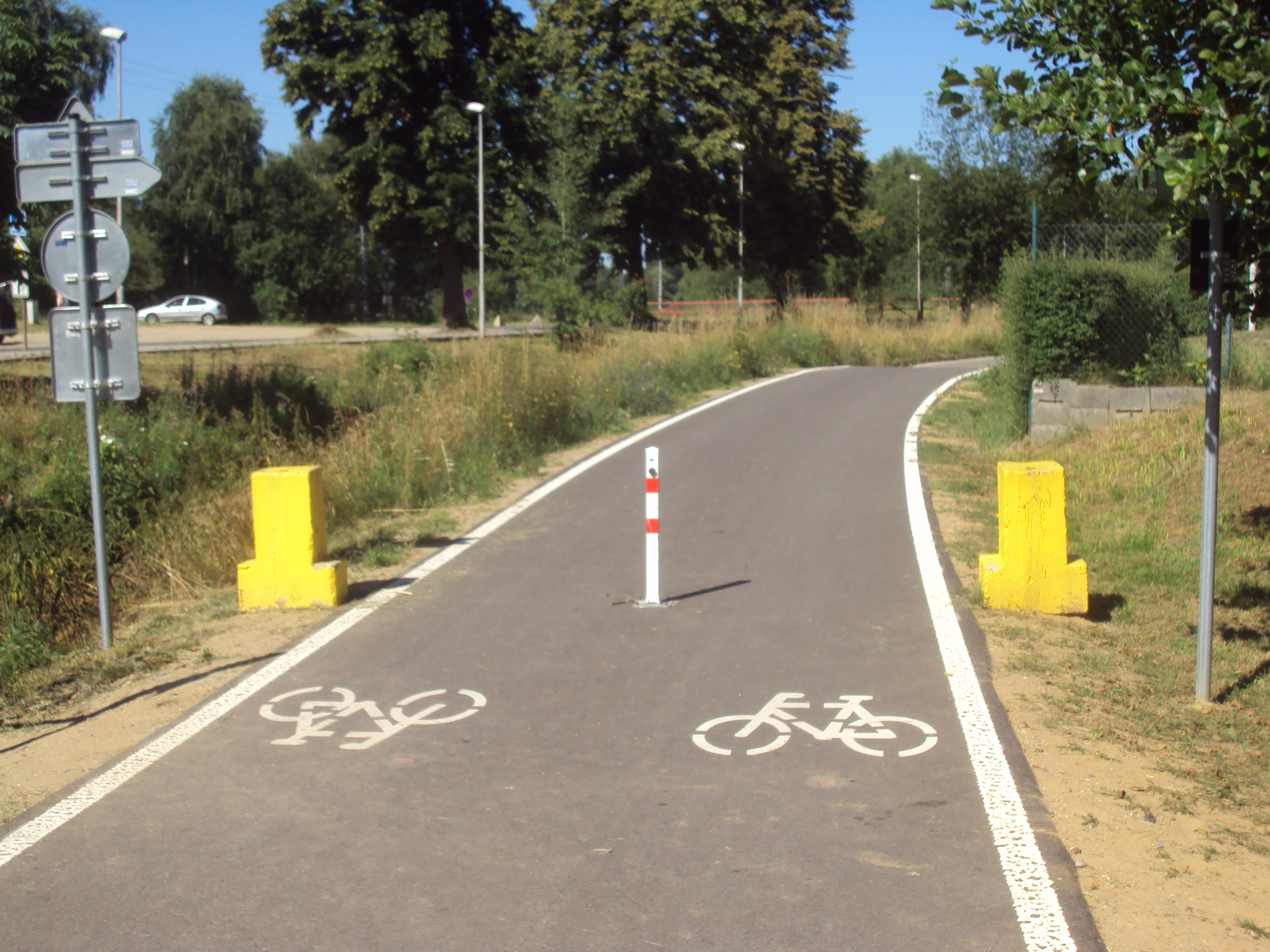 Nová Zelená cyklomagistrála Ploučnice, okraj Stráže pod Ralskem